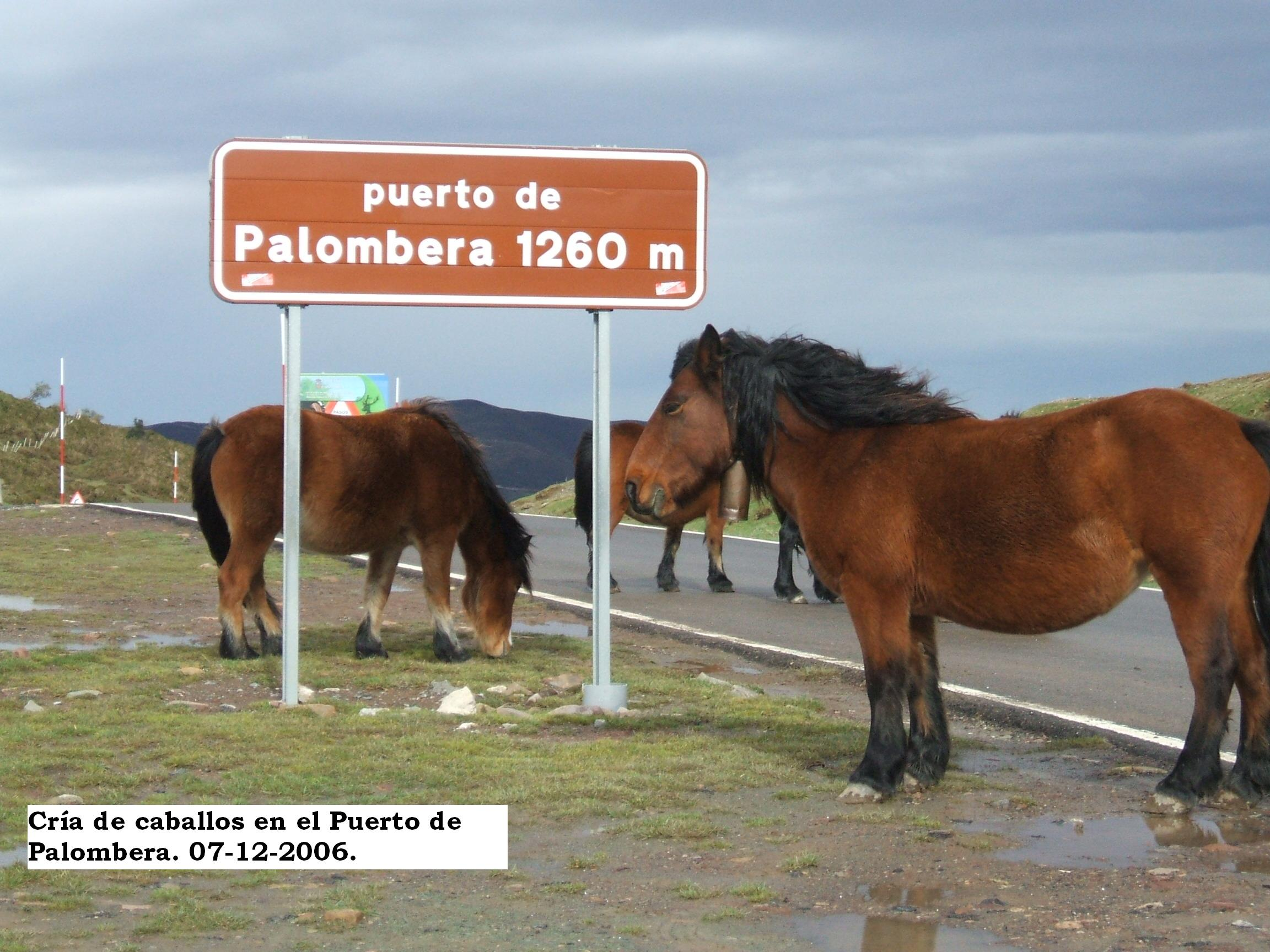 Caballos